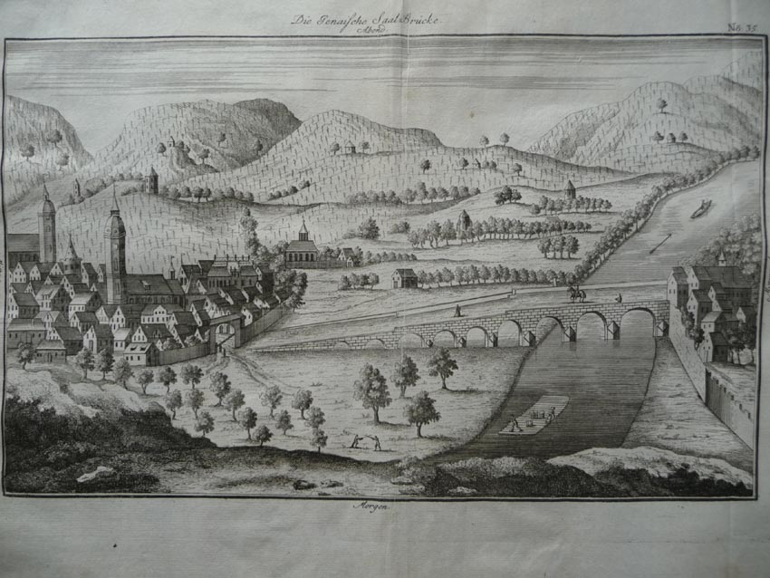 Die Camsdorfer Brücke im Jahr 1735 Werk: "Historischer Schauplatz, in welchem die Merkwürdigsten Brücken aus allen vier Theilen der welt, Insonderheit aber..." Autor/Druck: Carl Christian Schramm (1703-?), Gedruckt bei Breitkopf in Leipzig, 1735 Titel der Ansicht: "Die Jenaische Saal-Brücke." Informationen: Kupferstich aus dem deutschsprachigen Architekturwerk des Spätbarock "Historischer Schauplatz, in welchem die Merkwürdigsten Brücken..." von Schramm. Das Buch wurde 1735 bei Breitkopf in Leipzig gedruckt. Zu sehen ist hier eine sehr schöne, detailreiche Ansicht von der Camsdorfer Brücke in Jena, Thüringen. Maße: Blatt ca.: 31,5 x 40,5 cm, Ansicht ca.: 20,5 x 33,5 cm Zustand: in gutem Zustand guter Druck Papier ist etwas fleckig wenige leichte Falten im Bereich des Bugs